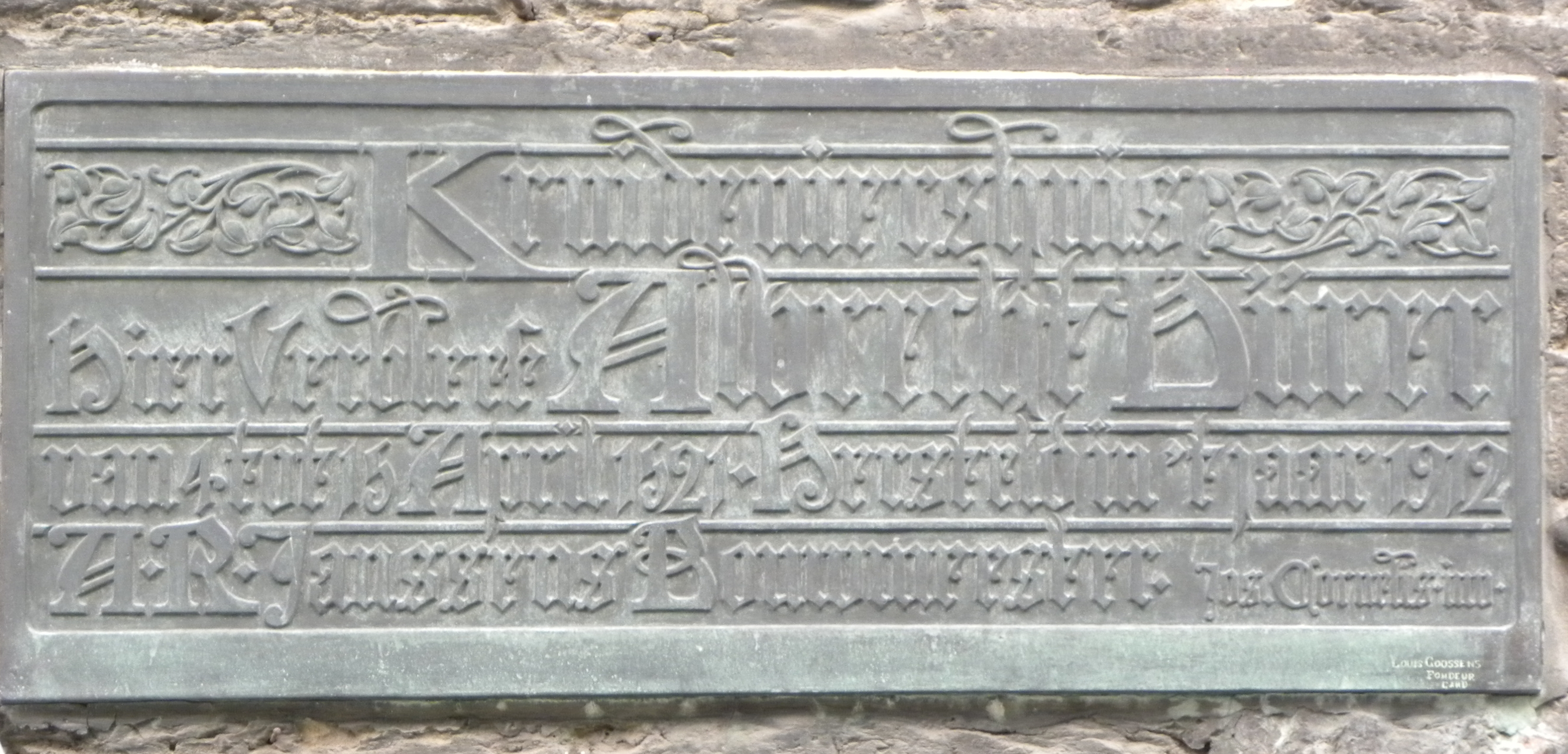 Plaque commémorative du passage de Dürer à Gand. Situé sur une façade rue "Klein Turkije" N° 4, le long de l'église St Nicolas, près de la place Braun. "Maison des Epiciers Ici séjourna Albrecht Dürer du 4 au 15 avril 1521. Rétabli en l'an 1912. A.R. Janssens maître d'ouvrage. Jos Cornelis Ingénieur Louis Janssens, Fondeur. Gand."